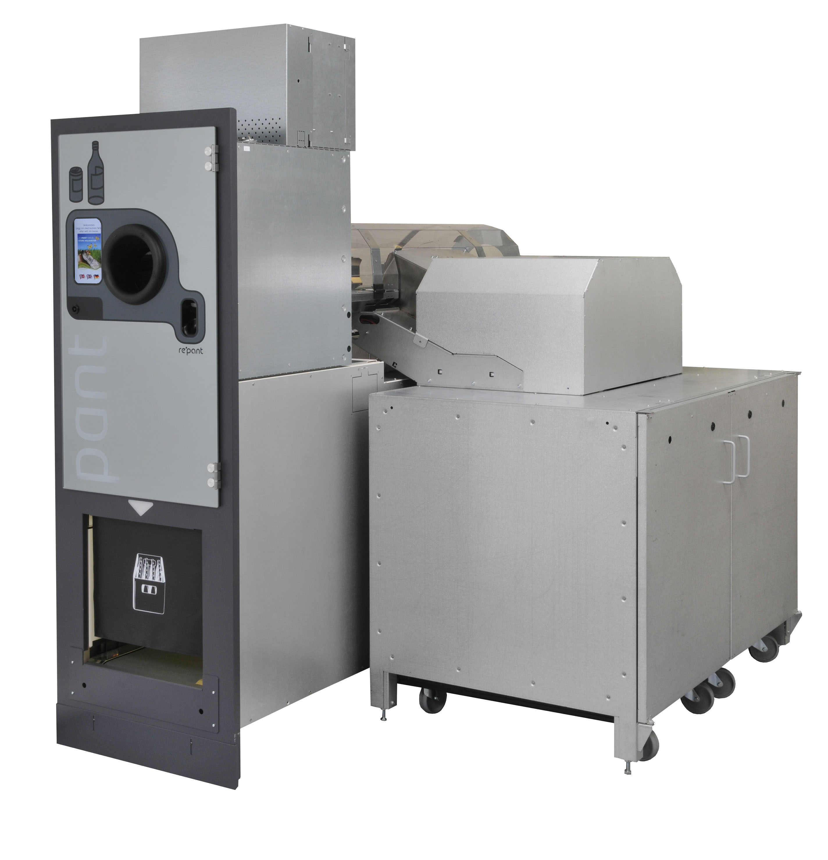 Repant COSMOS 47602110